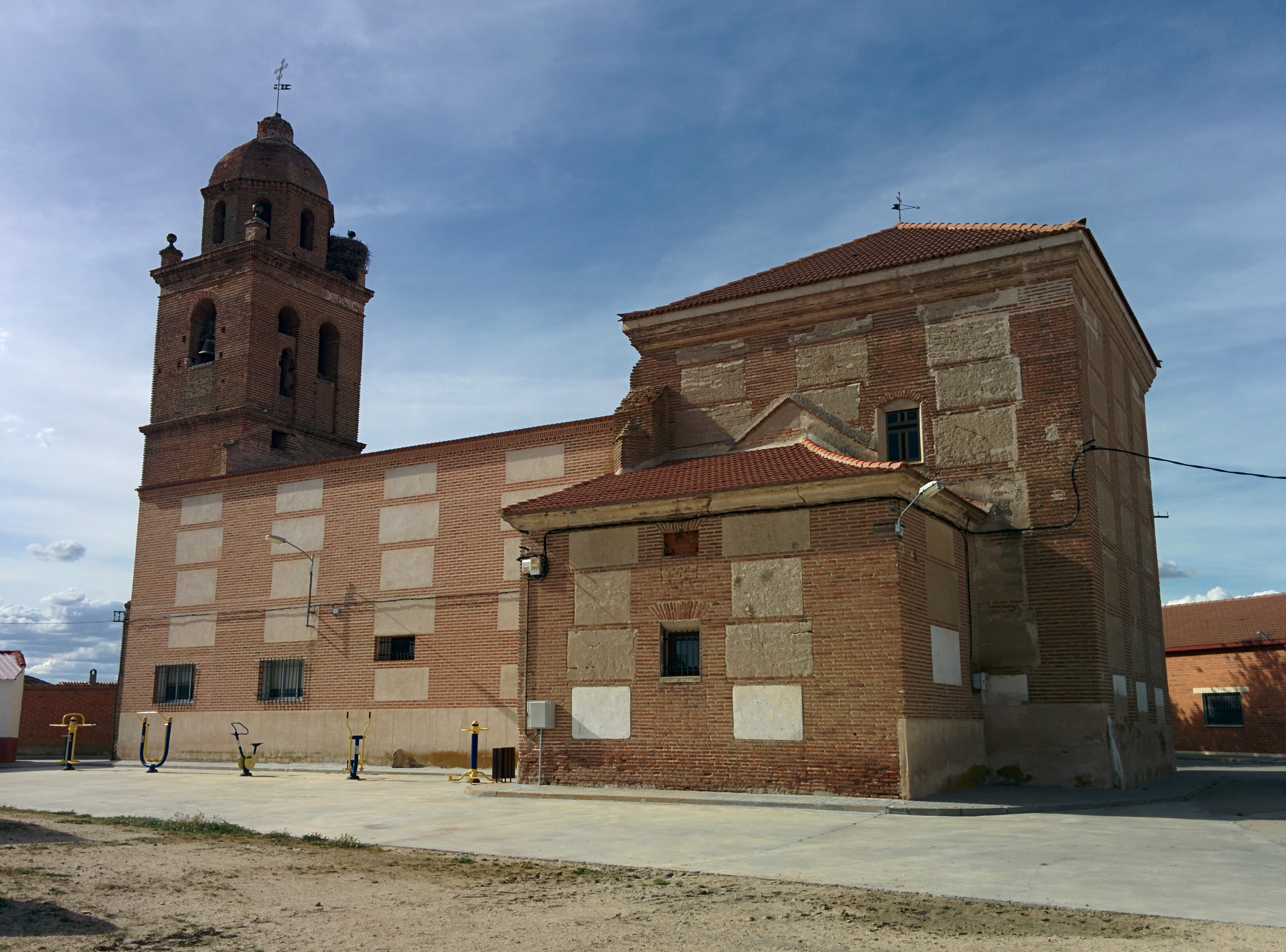 Iglesia de la Invención de la Santa Cruz, en Salvador de Zapardiel (Valladolid, España).